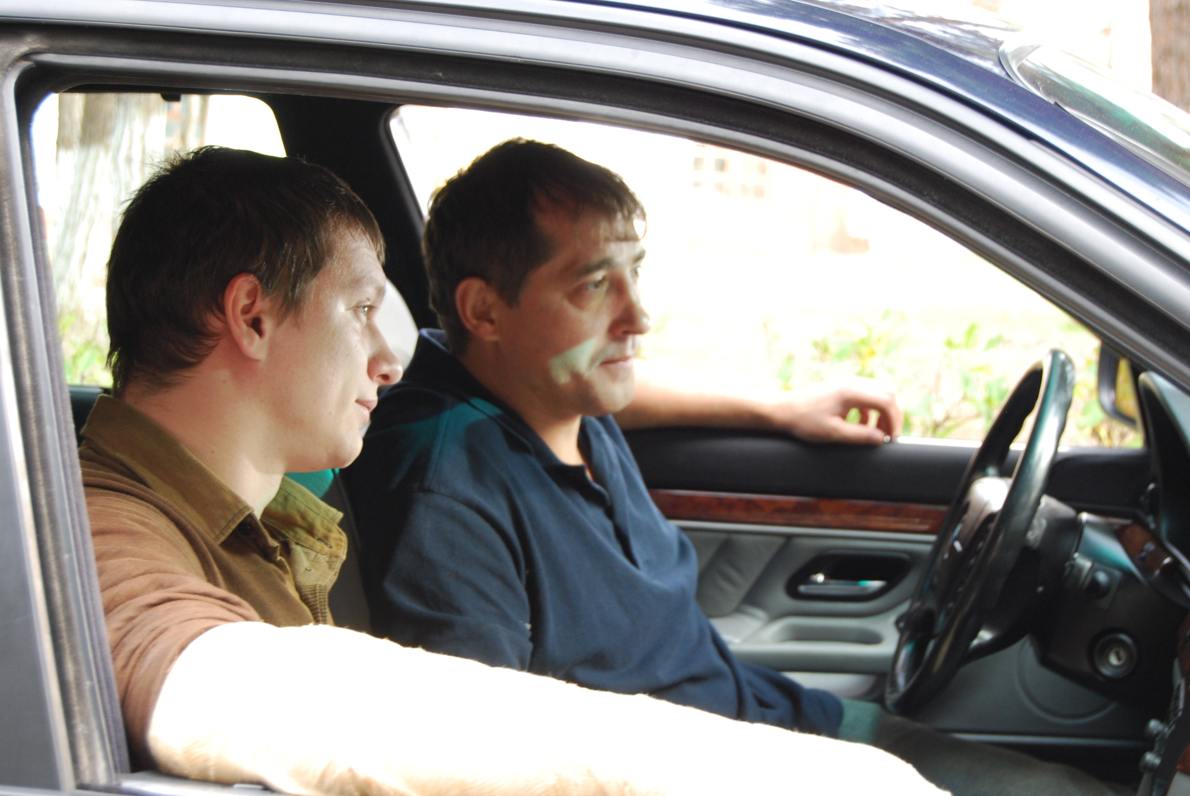 съёмки фильма "Раджа Васька"